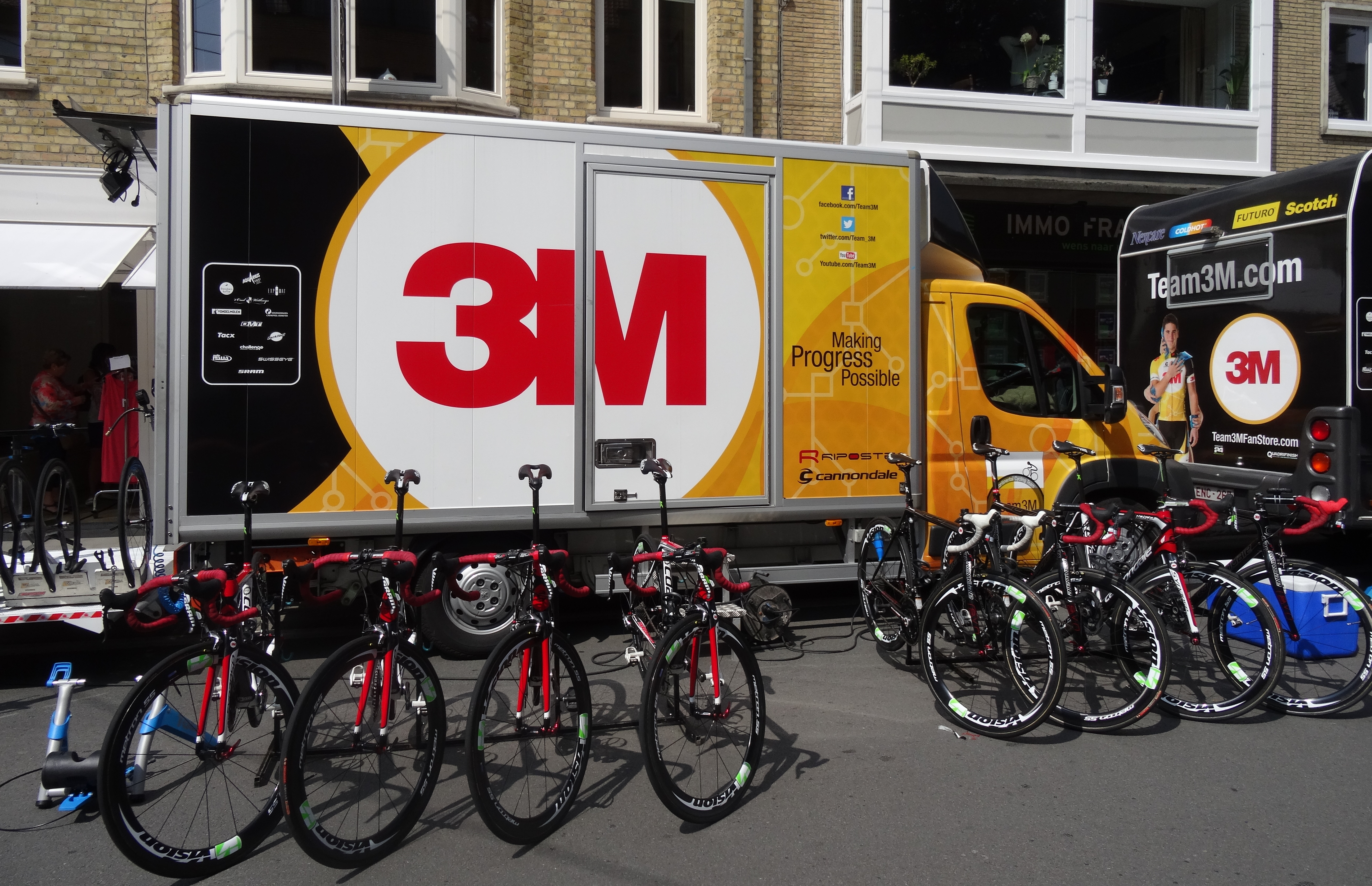 Reportage photographique réalisé le vendredi 30 mai à l'occasion du contre-la-montre individuel de la troisième étape du Tour de Belgique 2014 à Dixmude, Belgique.